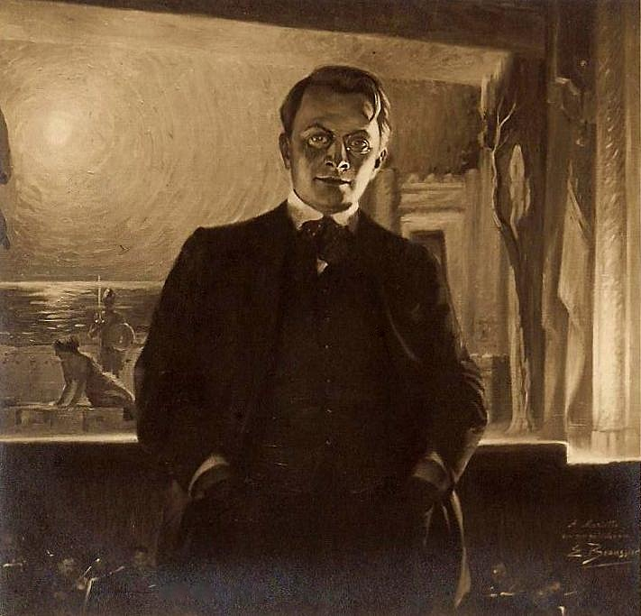 Le Compositeur Antoine Mariotte, peint par Emile Beaussier